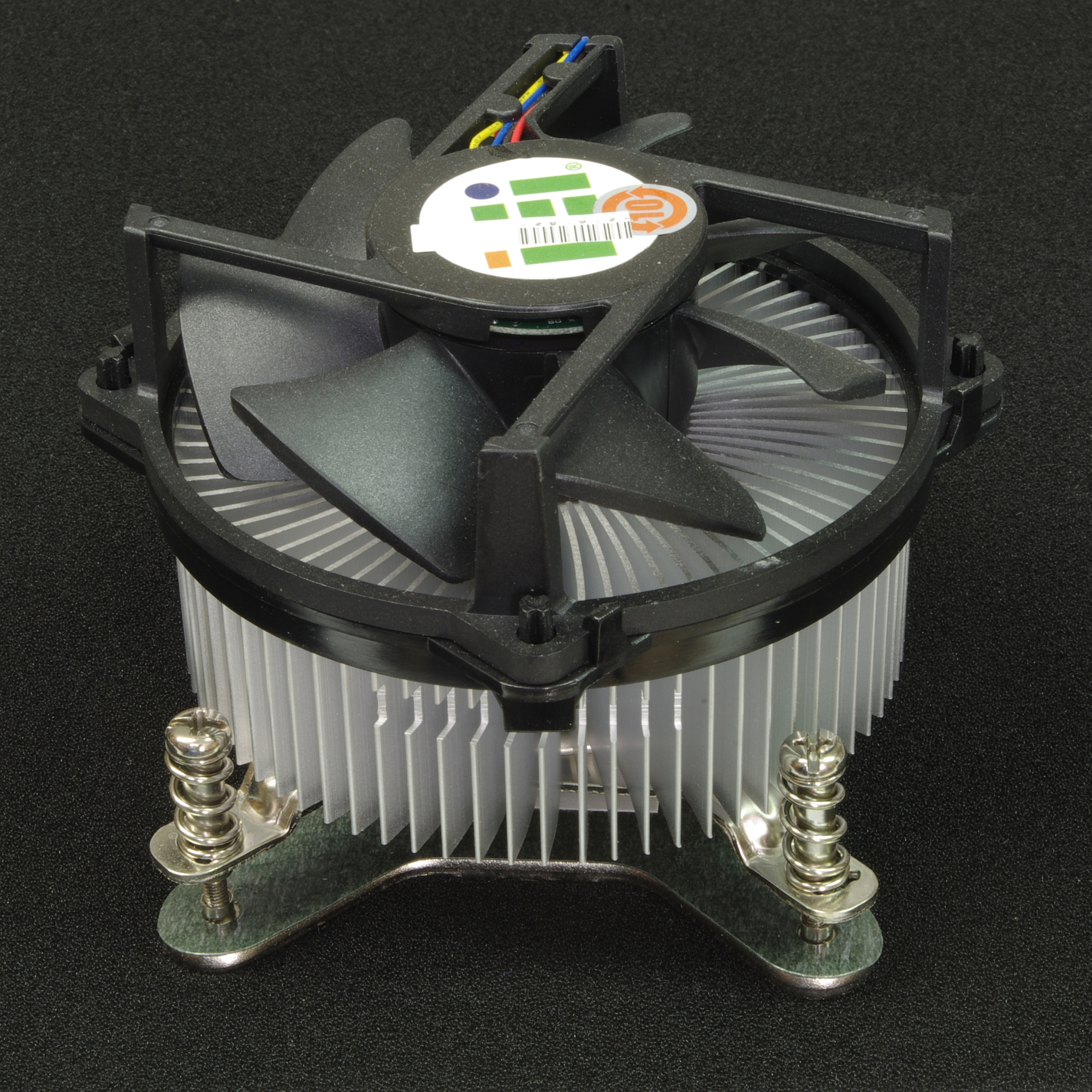 IEI Integration CPU-Kühler Sockel 775 mit Schraubbefestigung und Gegenplatte.